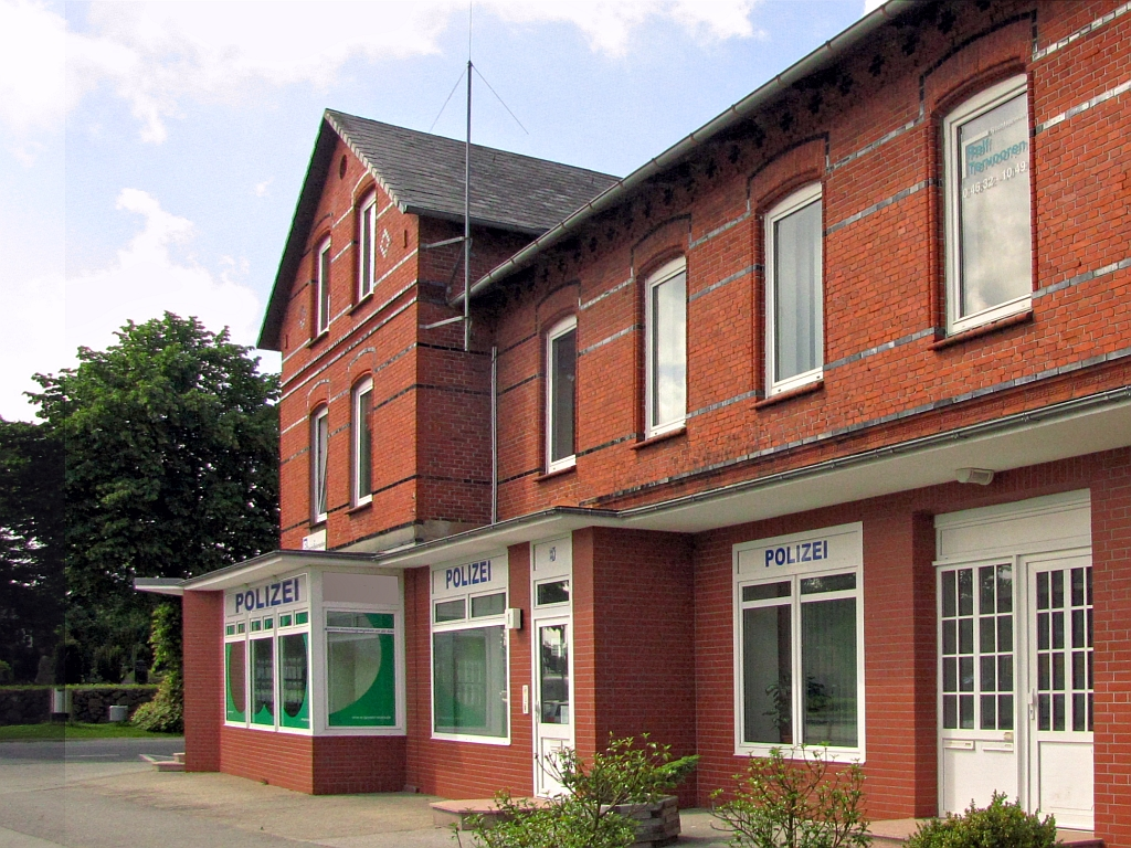 Polizei Schleswig-Holstein: die Polizeiwache an der Nordstraße in Steinbergkirche - Foto Wolfgang Pehlemann IMG_7116.jpg